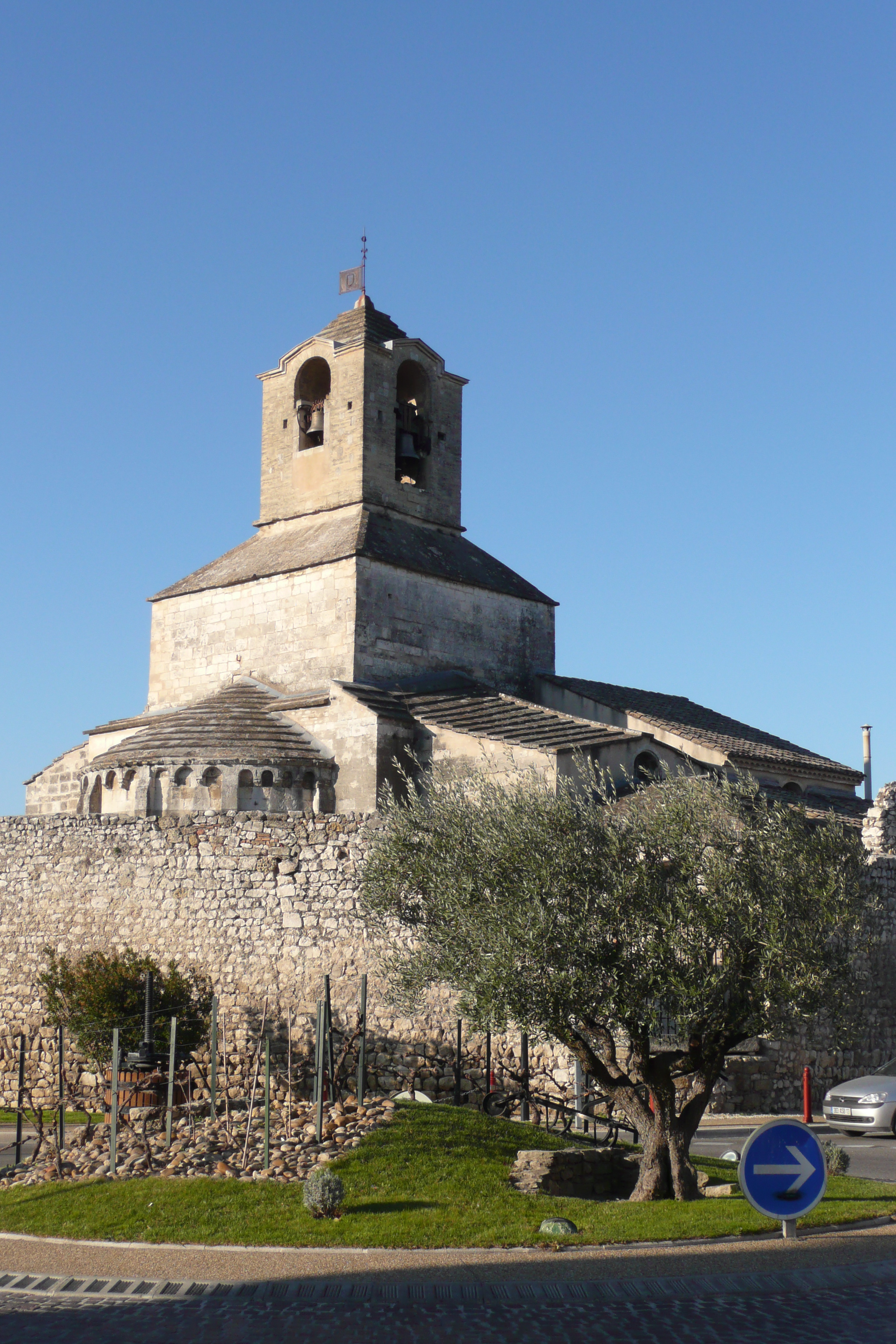 Eglise Sainte Baudile Noves.